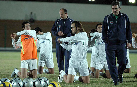 تمرین تیم ملی / جزیره کیش / بهمن ۱۳۸۳